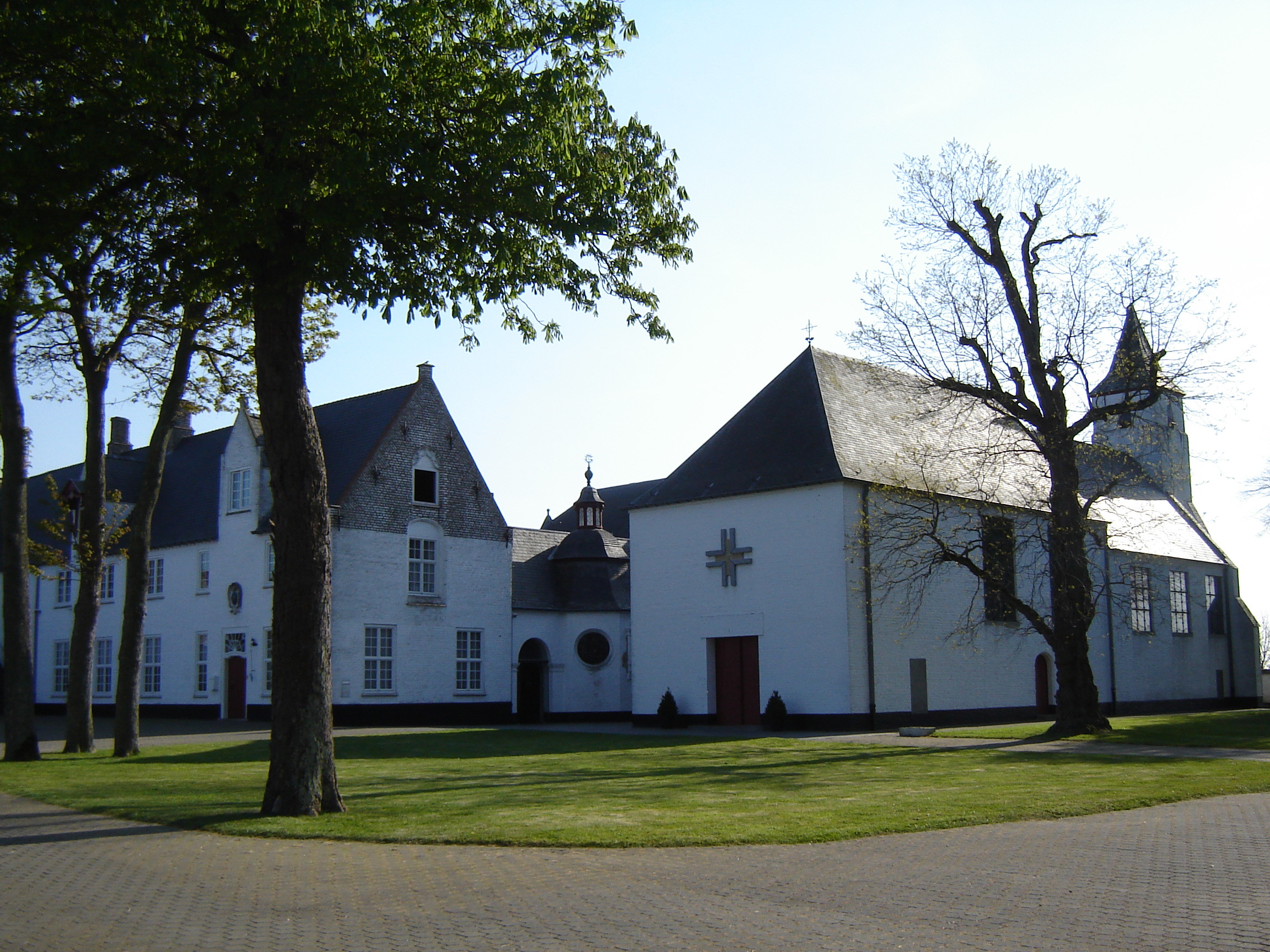 Abdij Ten Putte in Gistel Abdij Ten Putte, abbey in Gistel. Gistel, West Flanders, Belgium